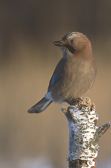 Garrulus glandarius